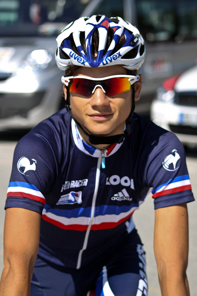 Kenny Elissonde lors du Tour de la Vallée d'Aoste 2011